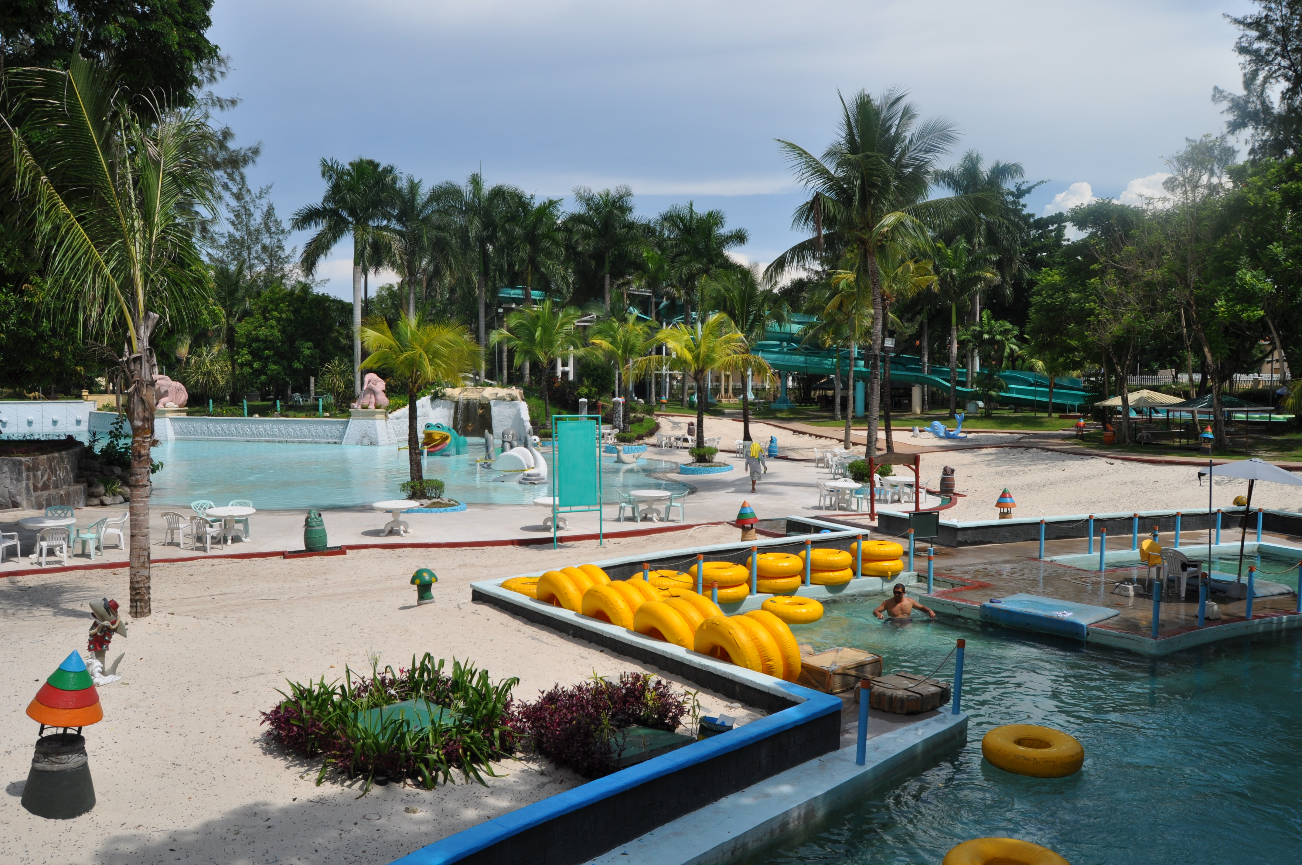 Fontana Water Park